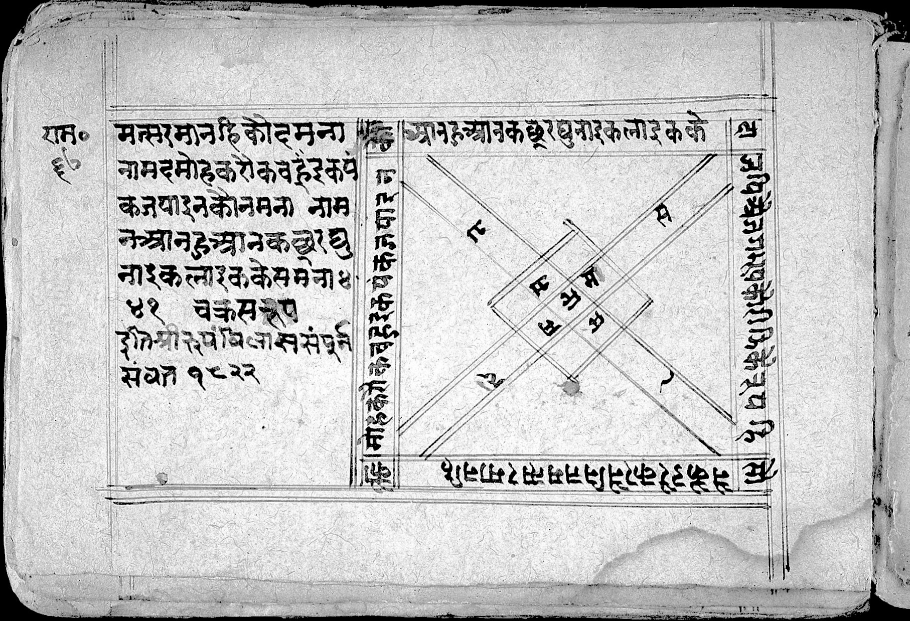 Rupasahi, Rupa-vilasa. Citrakavyas Asian Collection